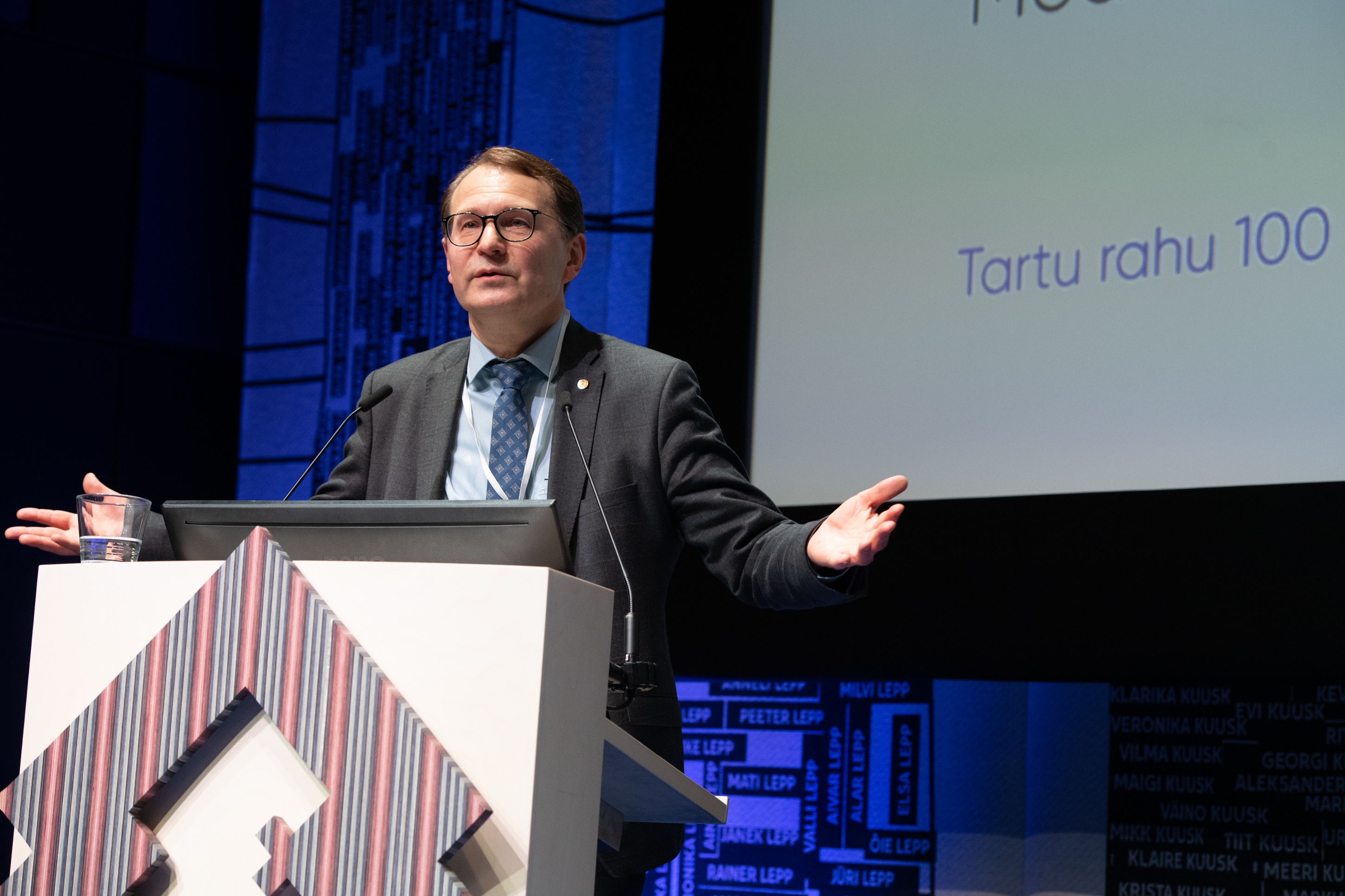 Dainius Žalimas, Tartu rahule pühendatud rahvusvaheline välispoliitika konverents